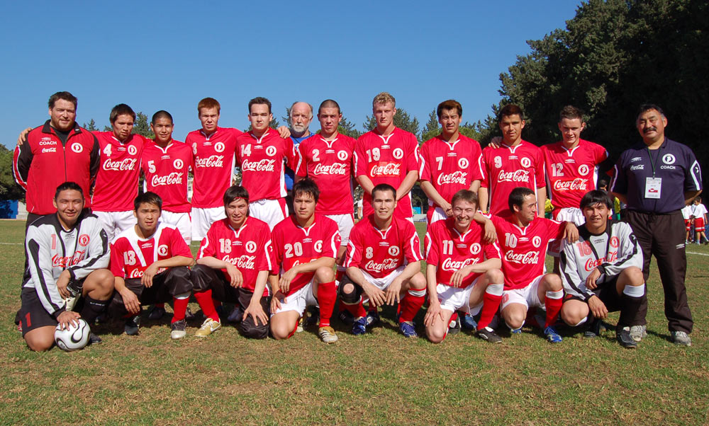 Fußballnationalmannschaft Grönlands